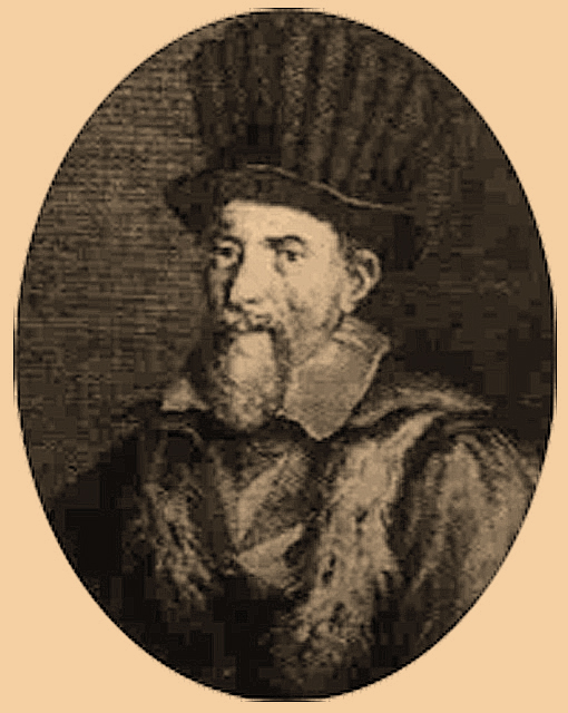 Antoine de Paule, Grand prieur de Saint-Gilles, grand maître de l'Ordre de Saint-Jean-de-Jérusalem